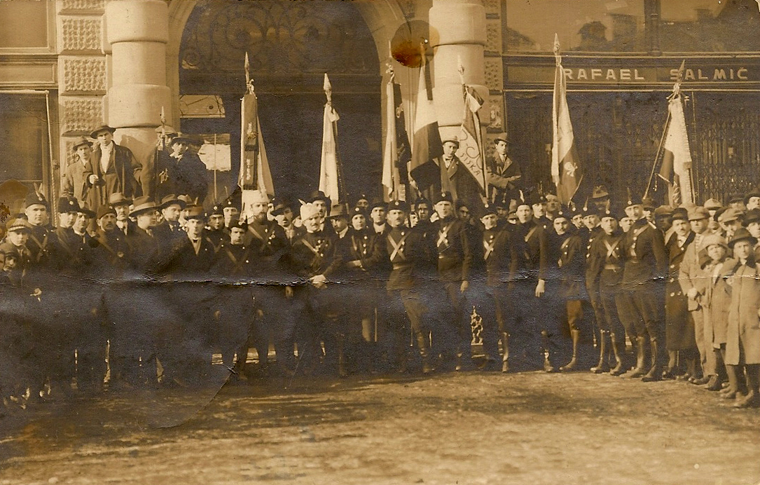 Orjuna v Celju.